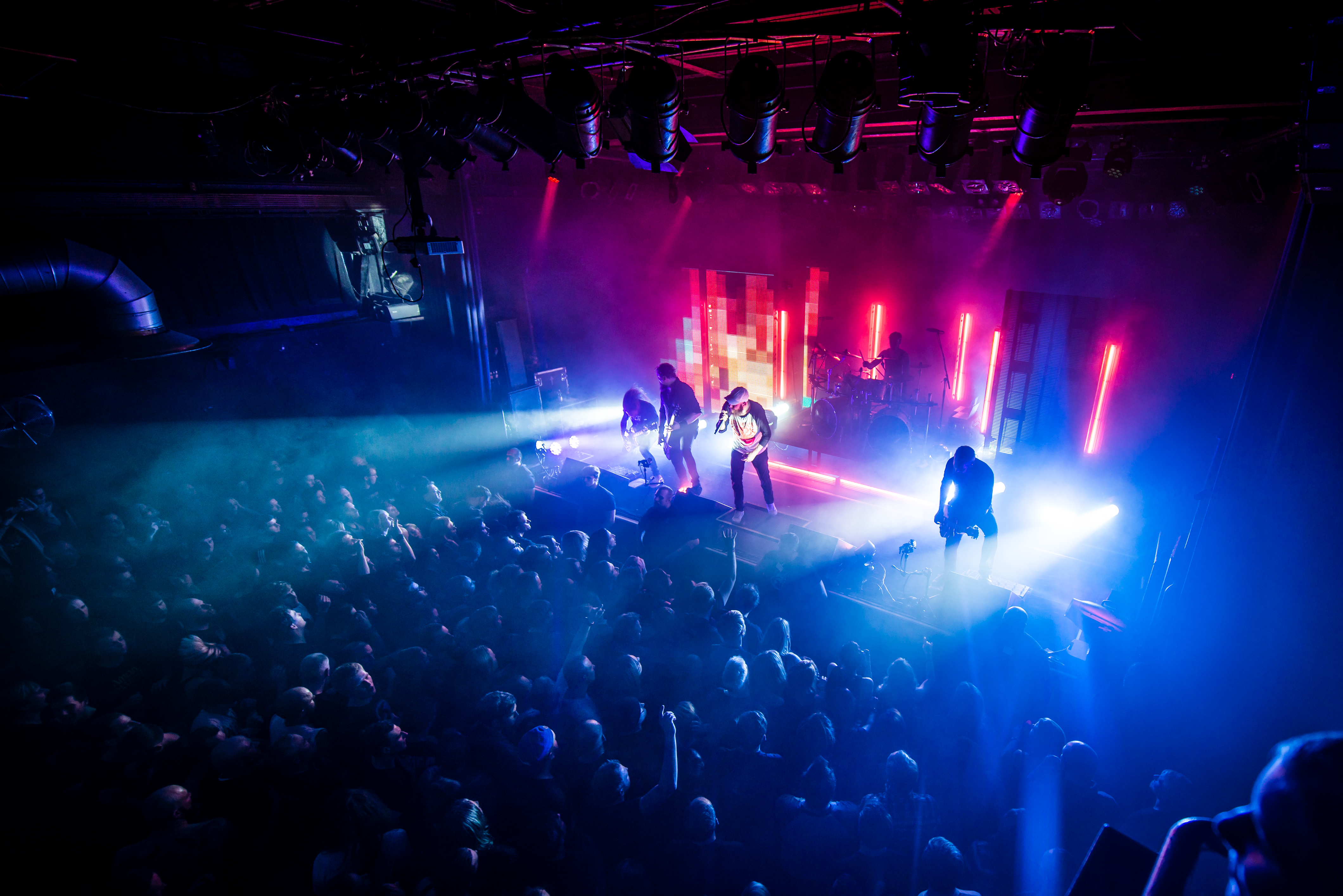 'In Flames Tour 2015 Bochum'